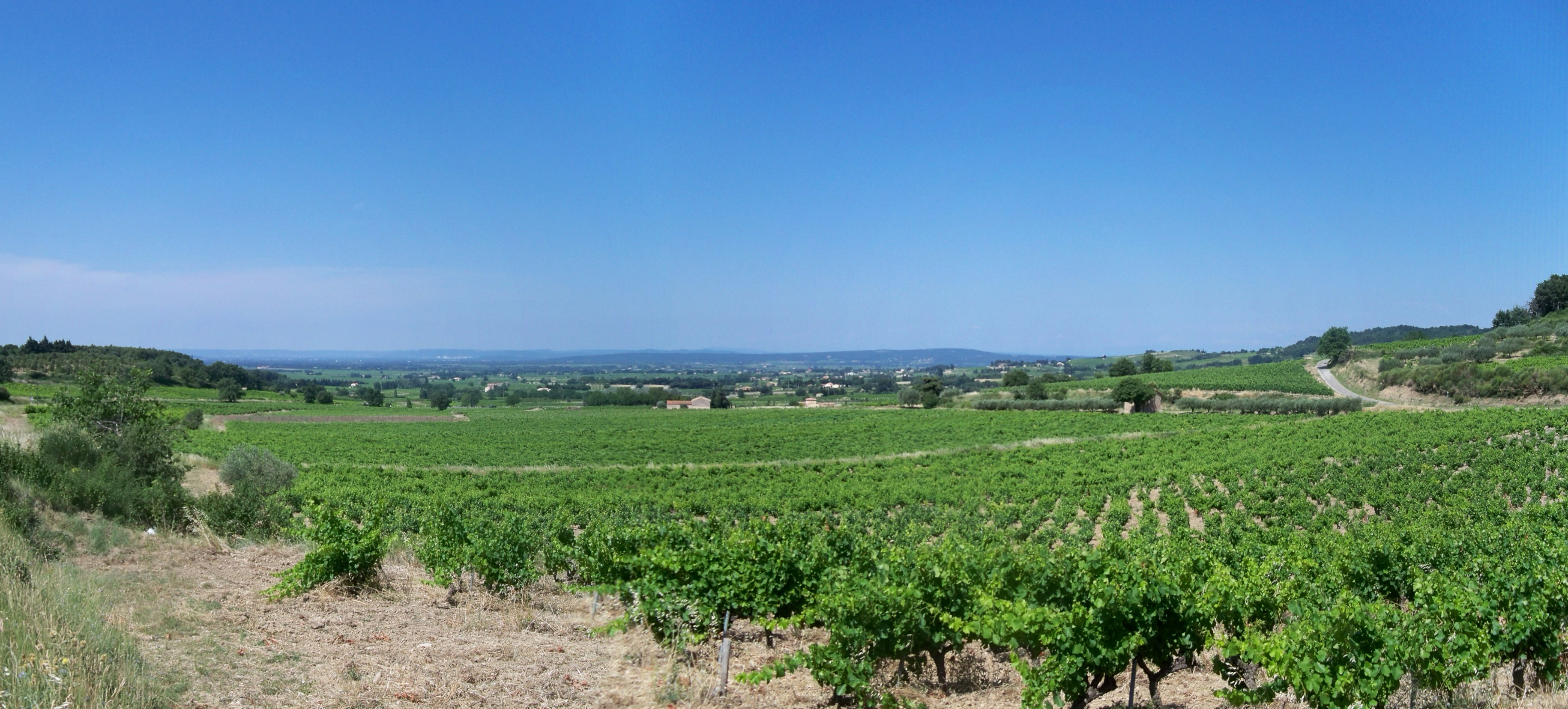 Vigoble de la Vallée du Rhône près de Rasteau, Vaucluse